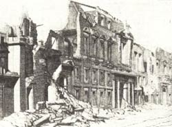 Il Palazzo Reale di Messina, distrutto dal terremoto del 1908.